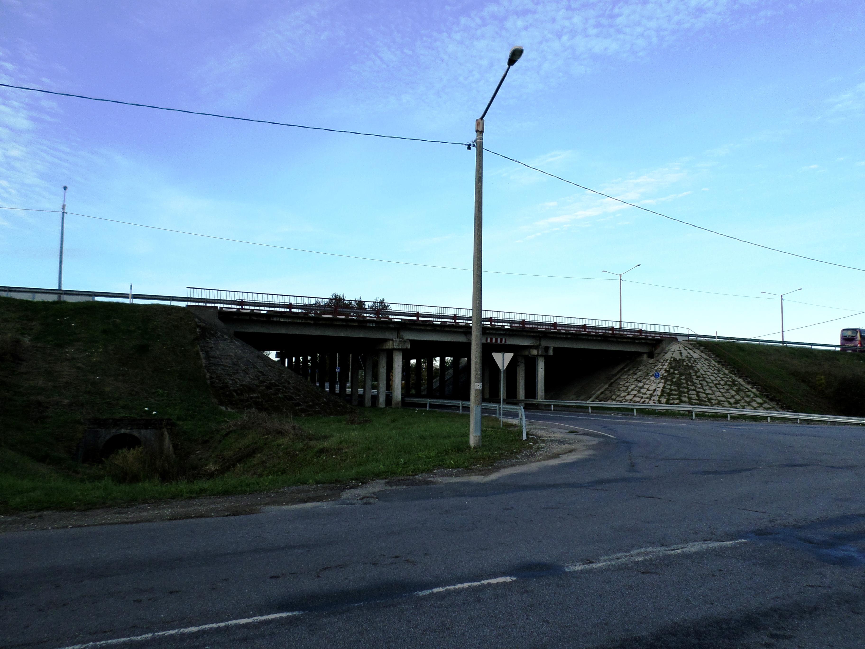 Assaku viadukt